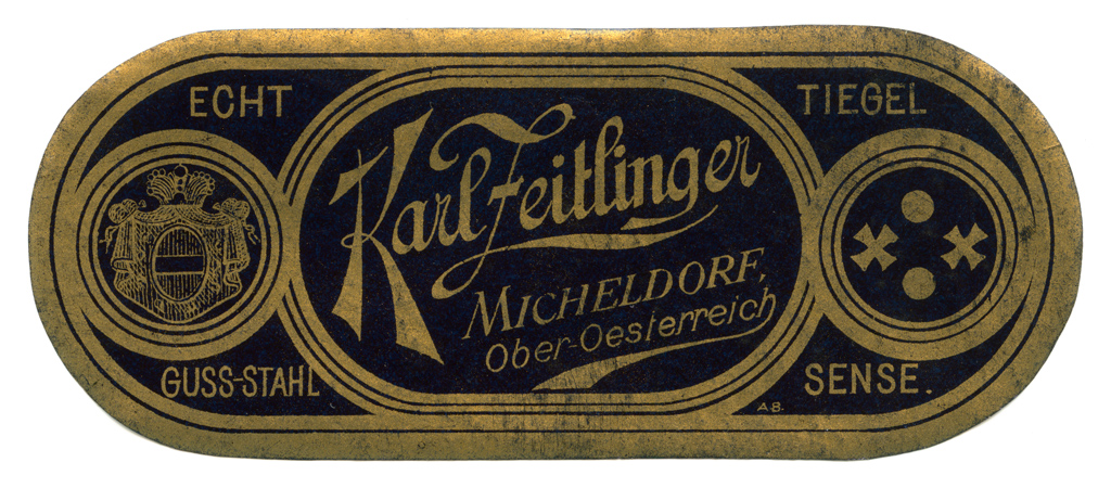 Aufkleber für ein Sensenblatt, beschriftet mit „Echt Tiegel Guss-Stahl Sense Karl Zeitlinger, Micheldorf“ und dem Zeichen „Zwei Kreuz“ der Sensenschmiede an der Pfuster.